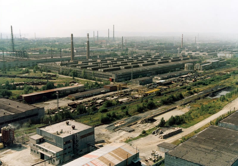 ПНТЗ, вид с высоты птичьего полета. Фото завода с вертолета